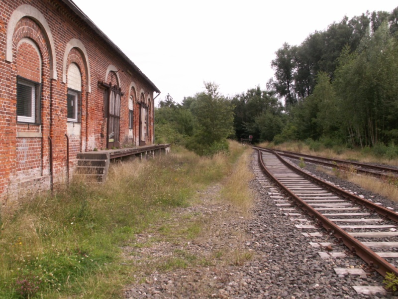 Eiderstedter Bahn